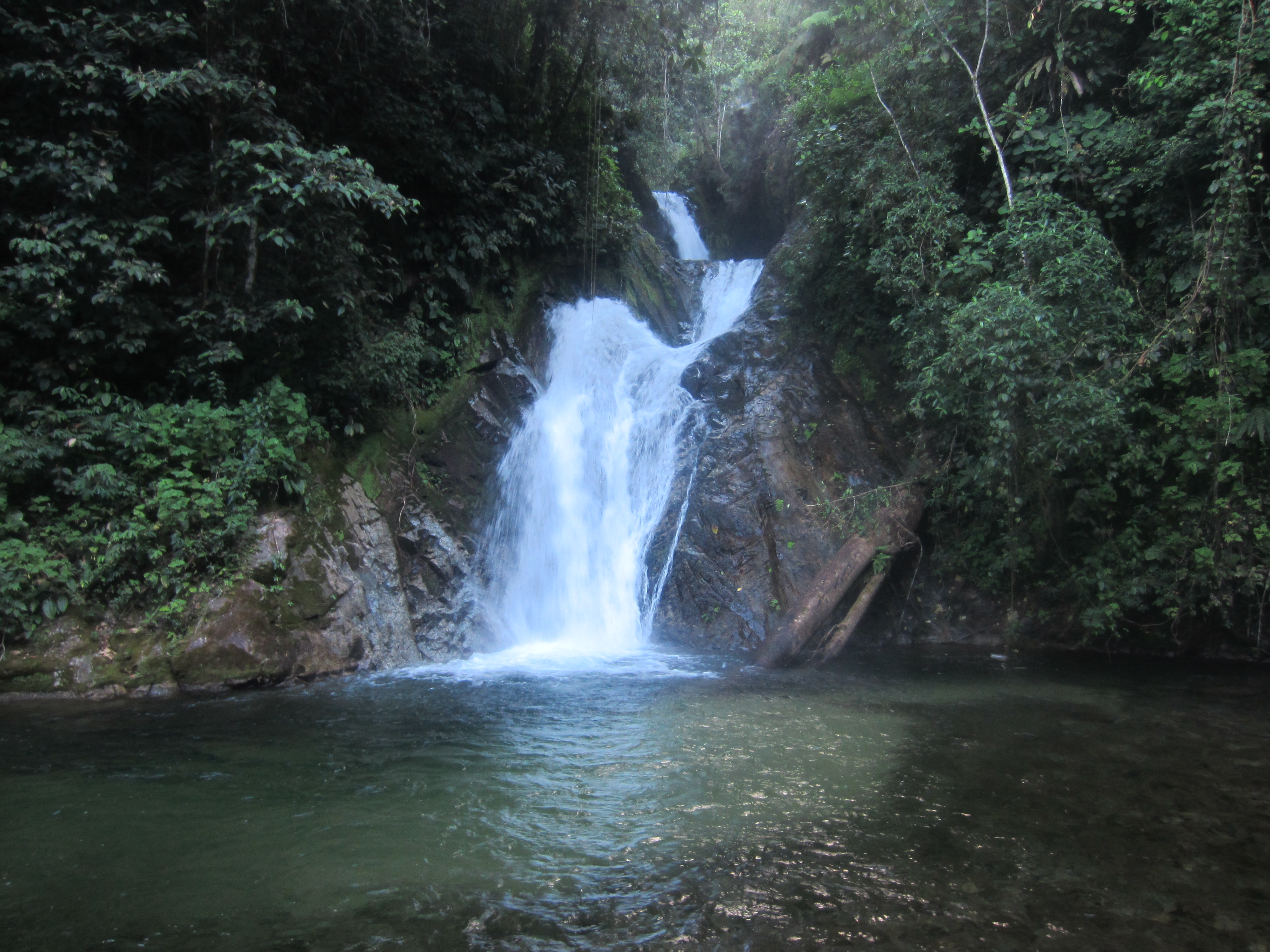 Esta ubicado en Satipo.